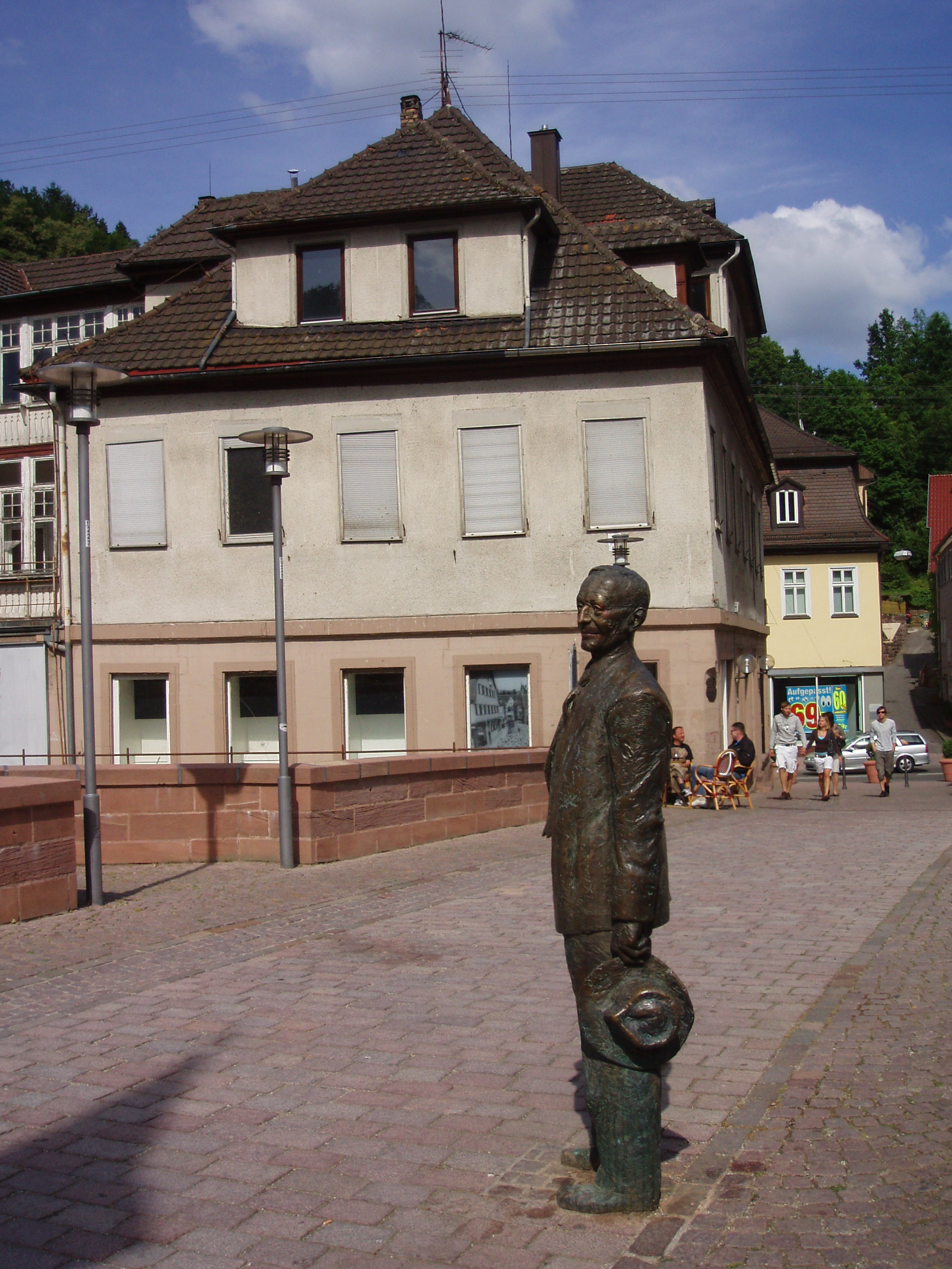 Haus Reichert von der Brücke aus gesehen, im Vordergrund das Hessestandbild von Kurt Tassotti